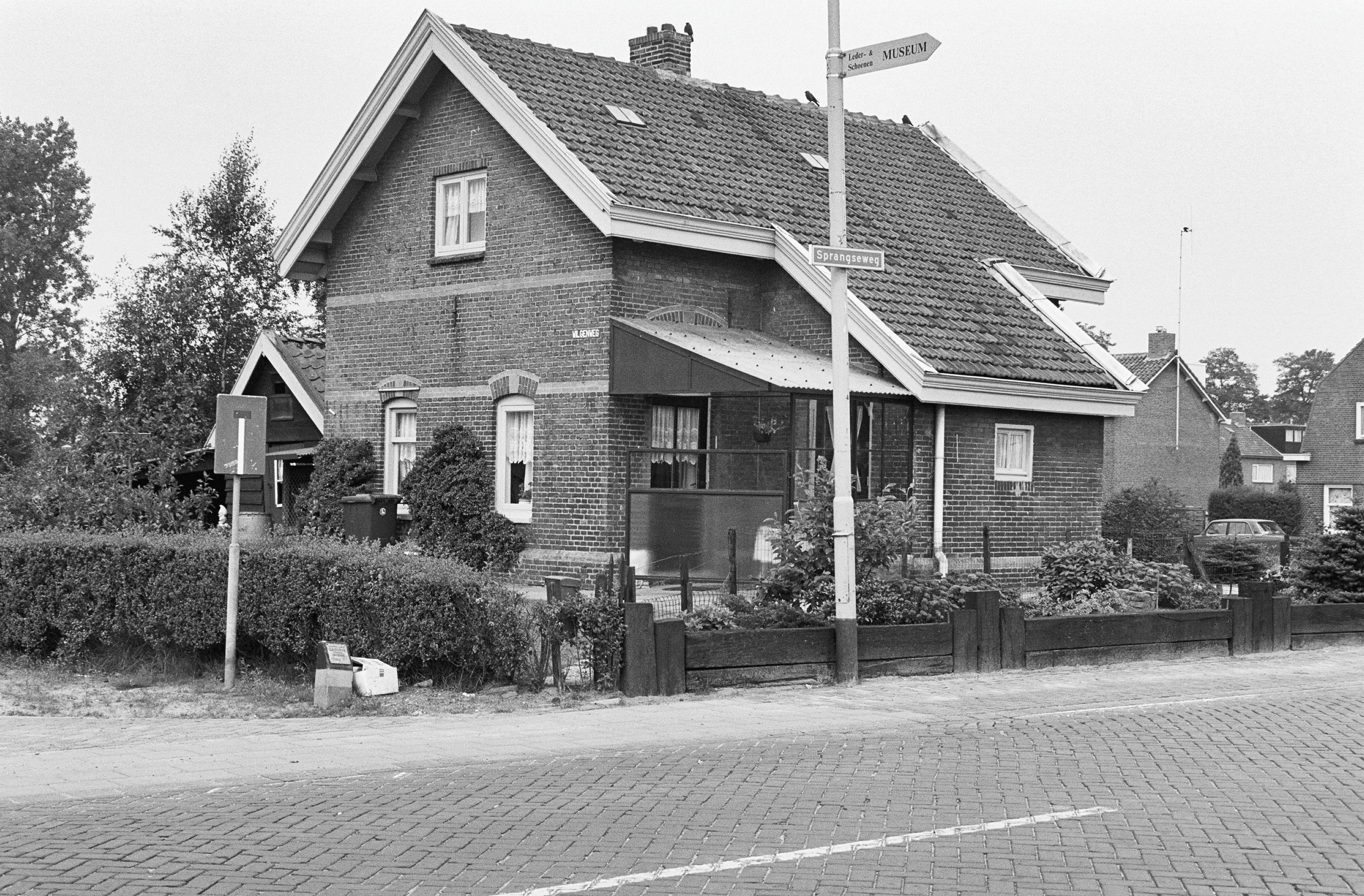 Wachtpost 25: Exterieur VOORGEVEL EN ZIJGEVEL